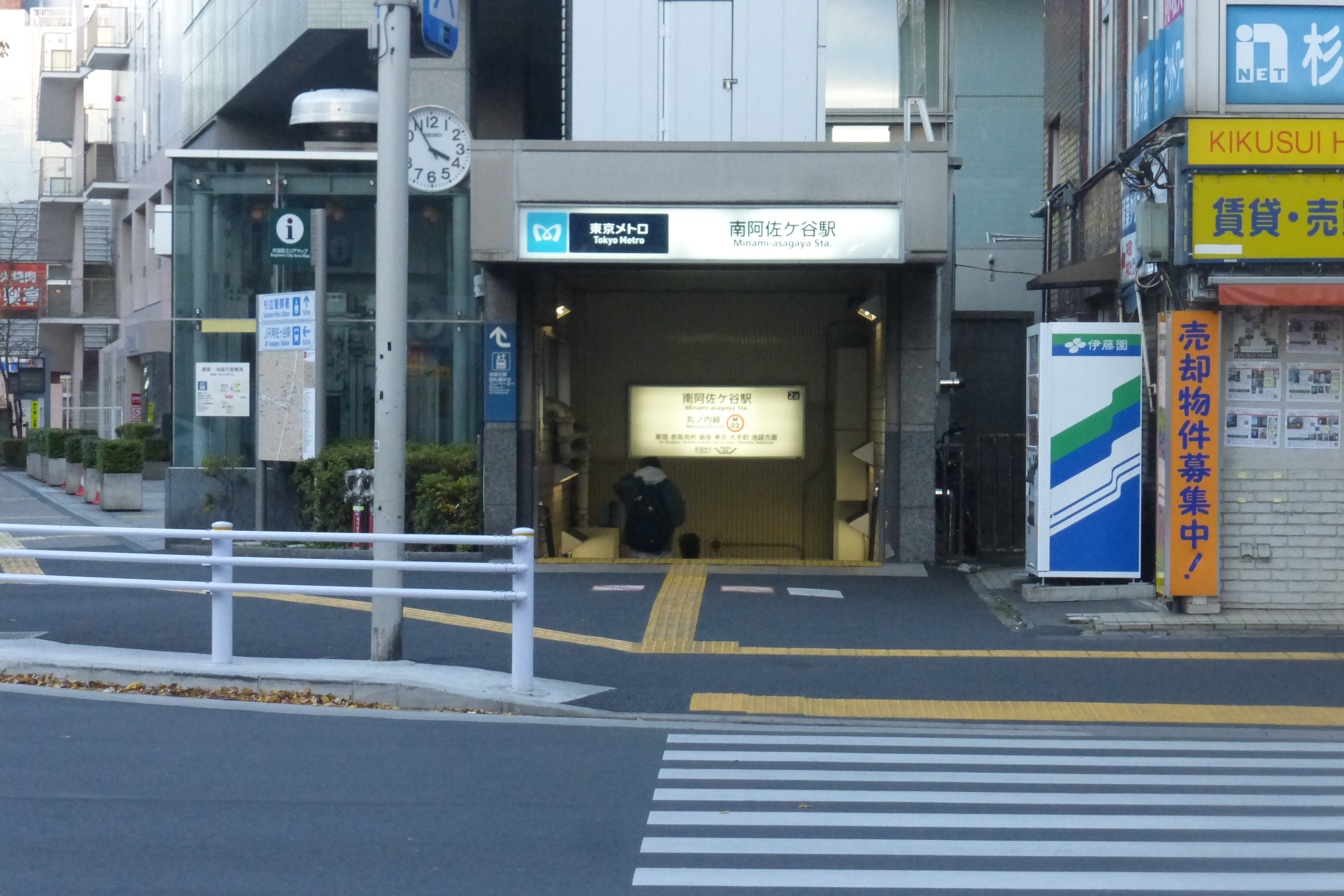 Minami-Asagaya Station (南阿佐ケ谷駅)